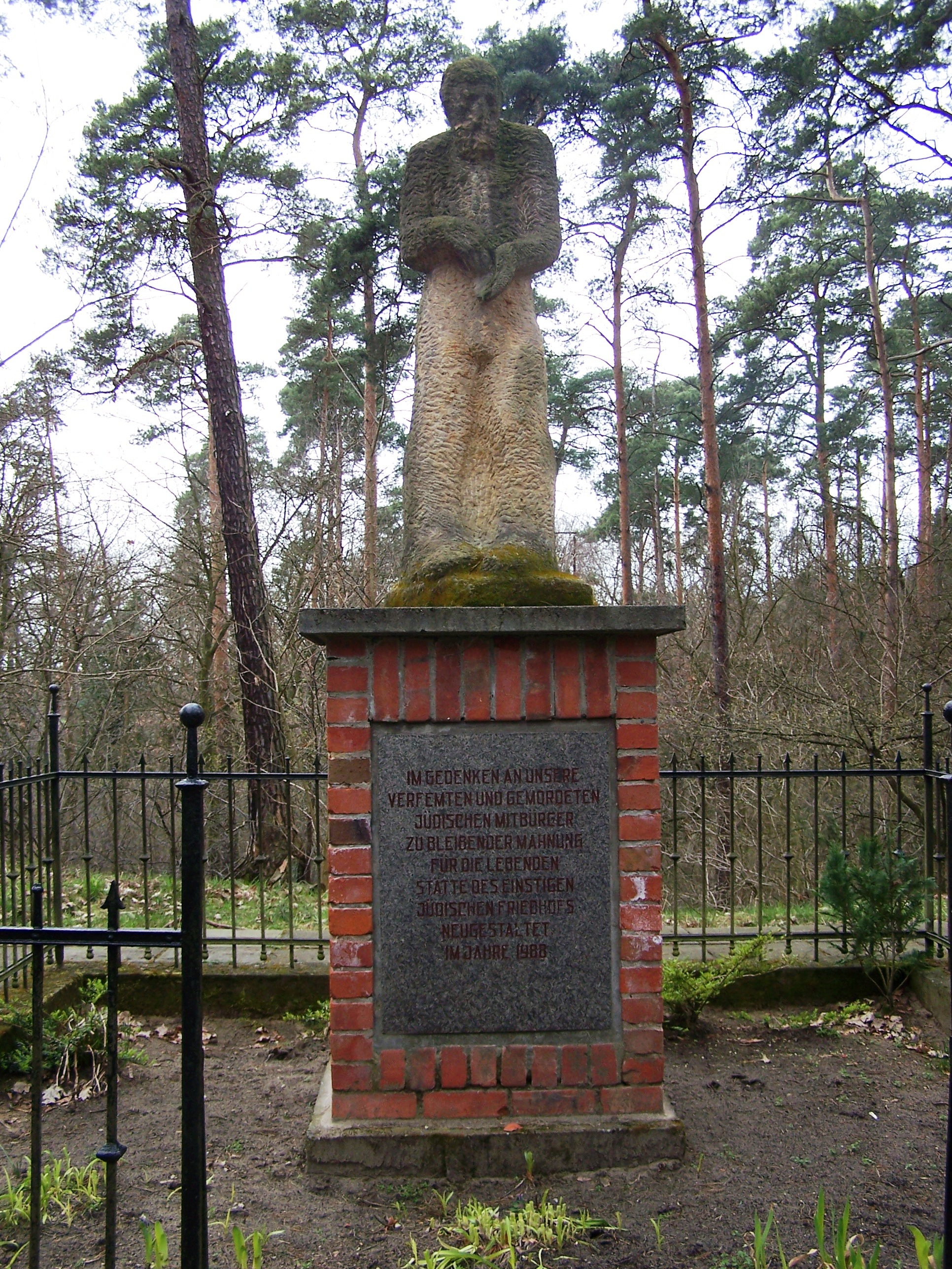 Denkmal für den Jüdischen Friedhof außerhalb von Nauen. Skulptur von Ingo Wellmann